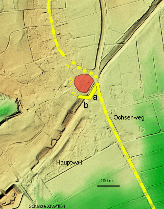 Kartierung eines Ausgrabungsbefundes in eine 3d-Karte